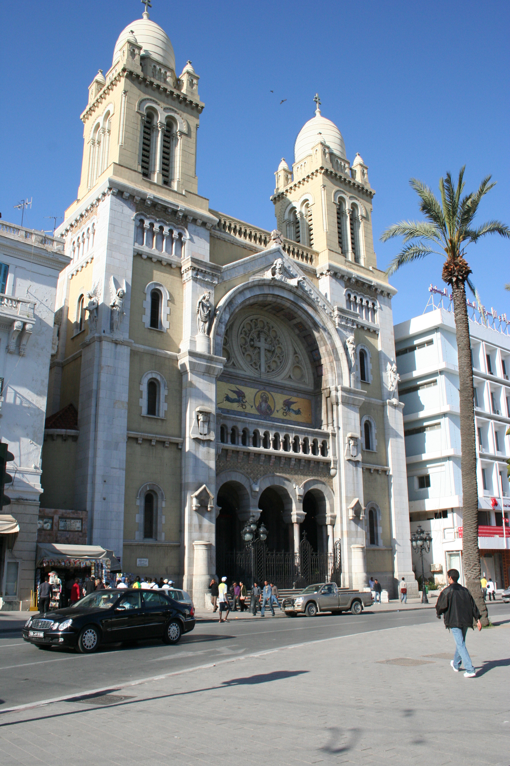 Cathédrale Saint-Vincent-de-Paul, Tunis, Tunisie